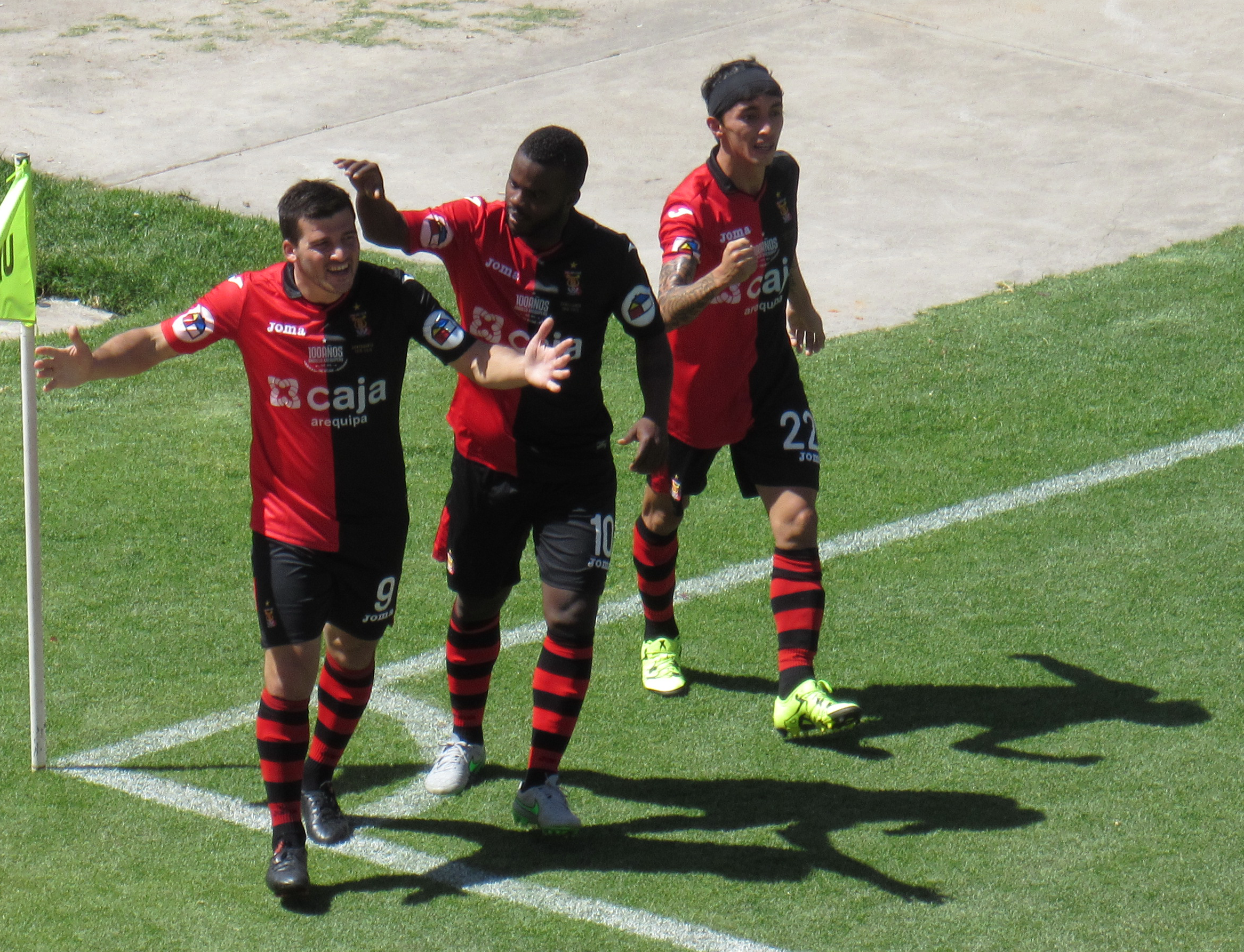 Bernardo Cuesta, Johnnier Montaño y Omar Fernández. Algunos de los Principales artífices del Campeonato Nacional 2015 del FBC Melgar.